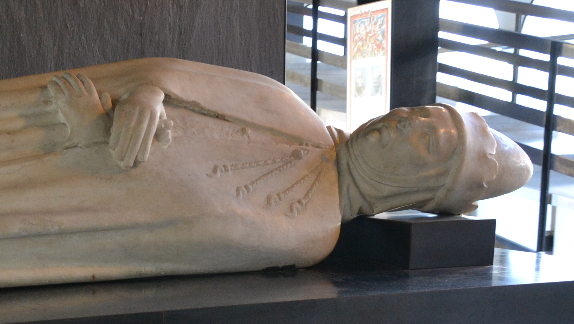 Museo di Sant'Agostino (Genova) Monumento sepolcrale di Simone Boccanegra